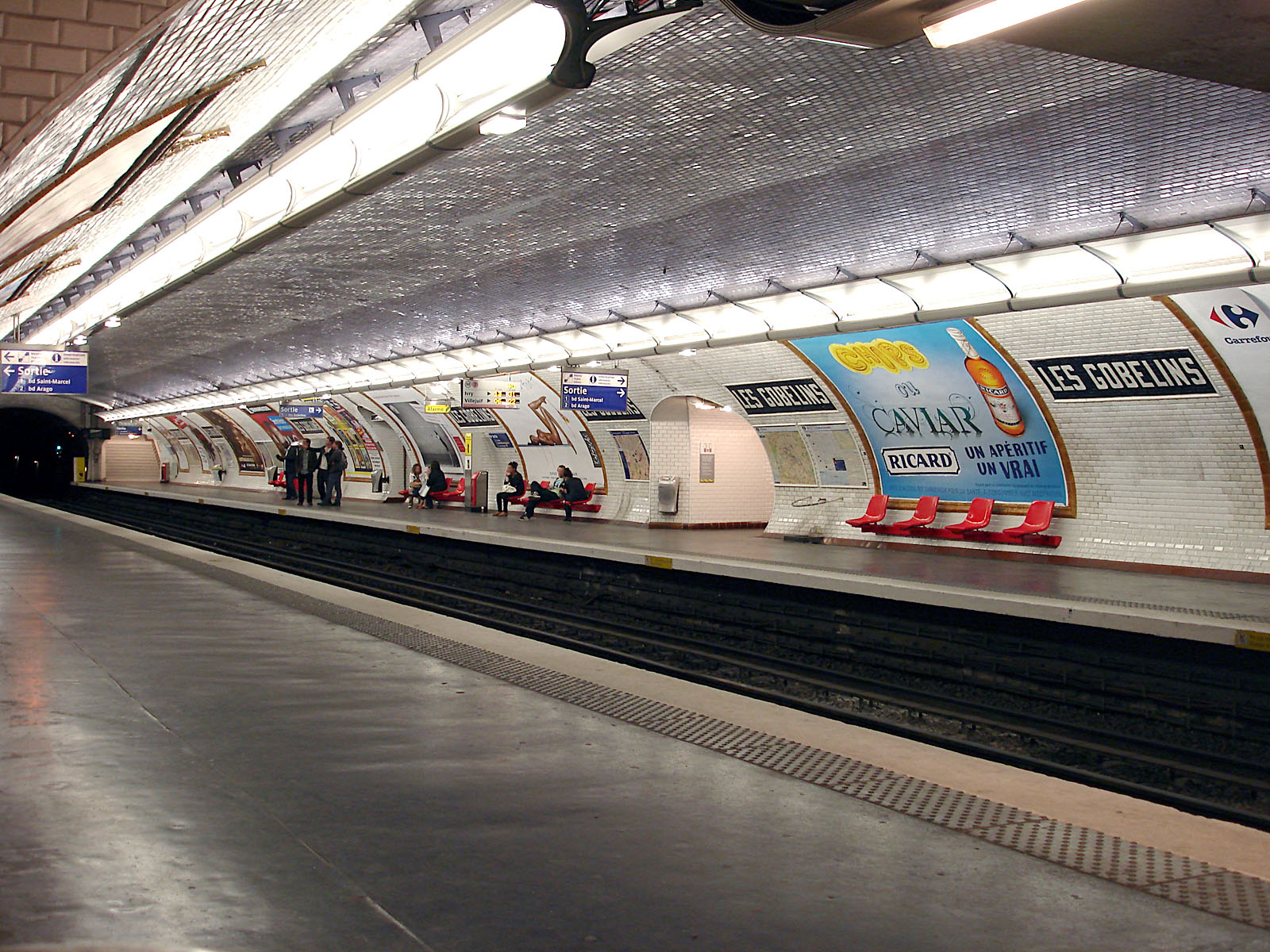 La station Les Gobelins de la ligne 7 du métro de Paris, France.